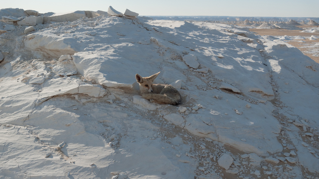 Rüppell's Fox Vulpes rueppellii, Egypt